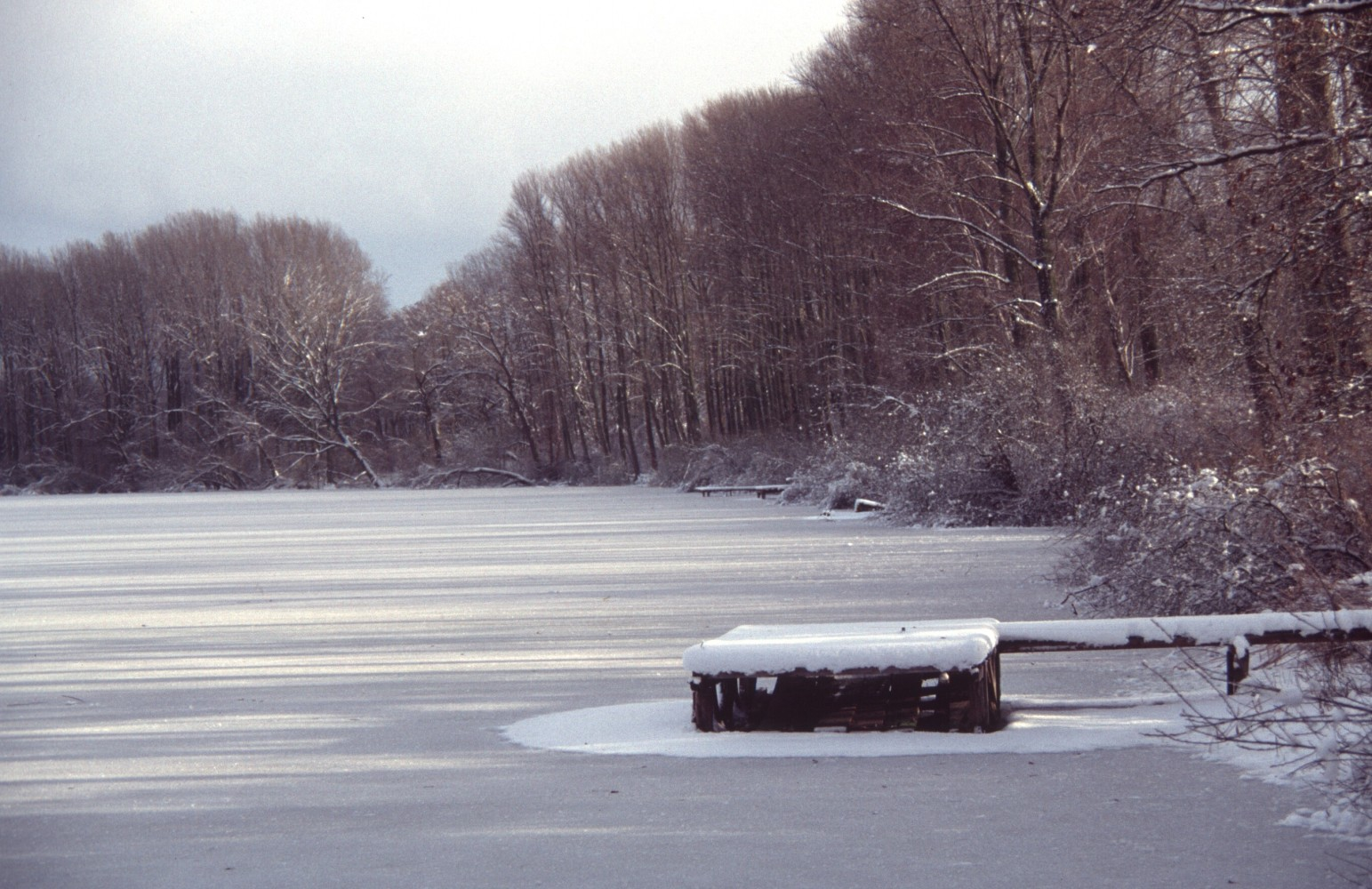 Neuhöfer Altrhein Winter Neuhofen (Pfalz) Rhein-Pfalz-Kreis Rheinland-Pfalz Germany